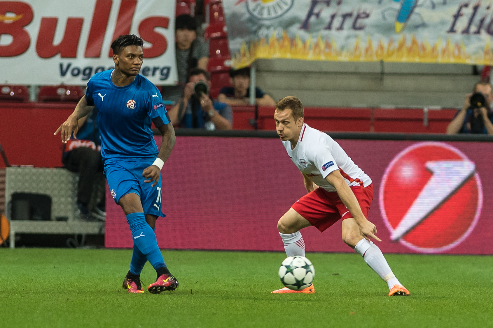 UEFA Champions League - Play-Offs - FC Salzburg vs Dinamo Zagreb. Bild zeigt Junior Fernandes (Dinamo Zagreb) und Christian Schwegler (RBS).